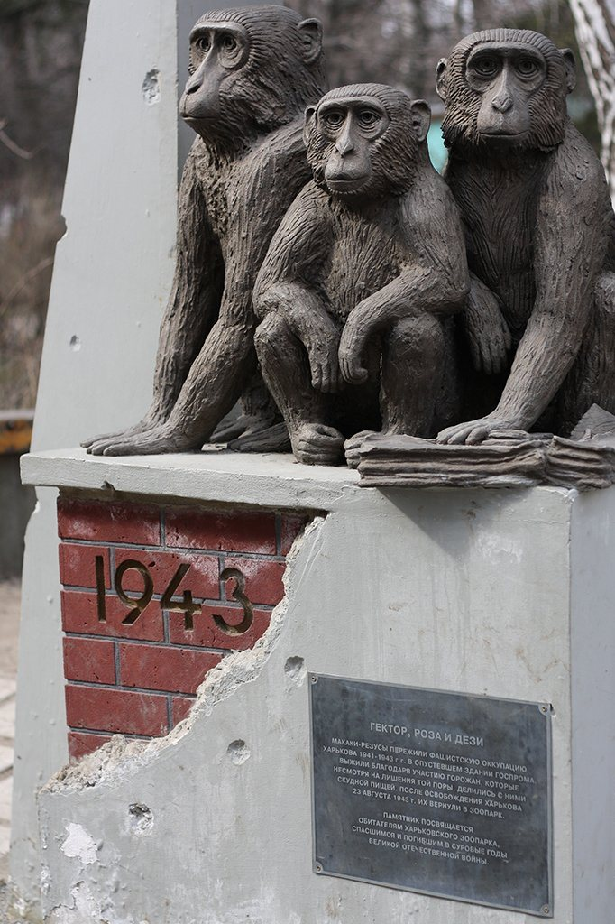 Монумент, посвященный спасшимся и погибшим животным в годы Великой отечественной войны. Изображены три макаки-резуса, жившие в полуразрушенном Госпроме в 1943 году. Харьковский зоопарк.